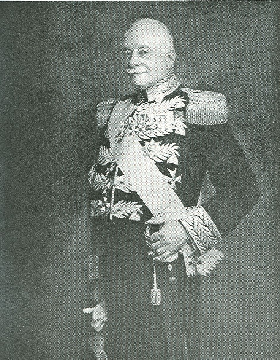 FranÃ§ois van Geen (gestorven in 1944)